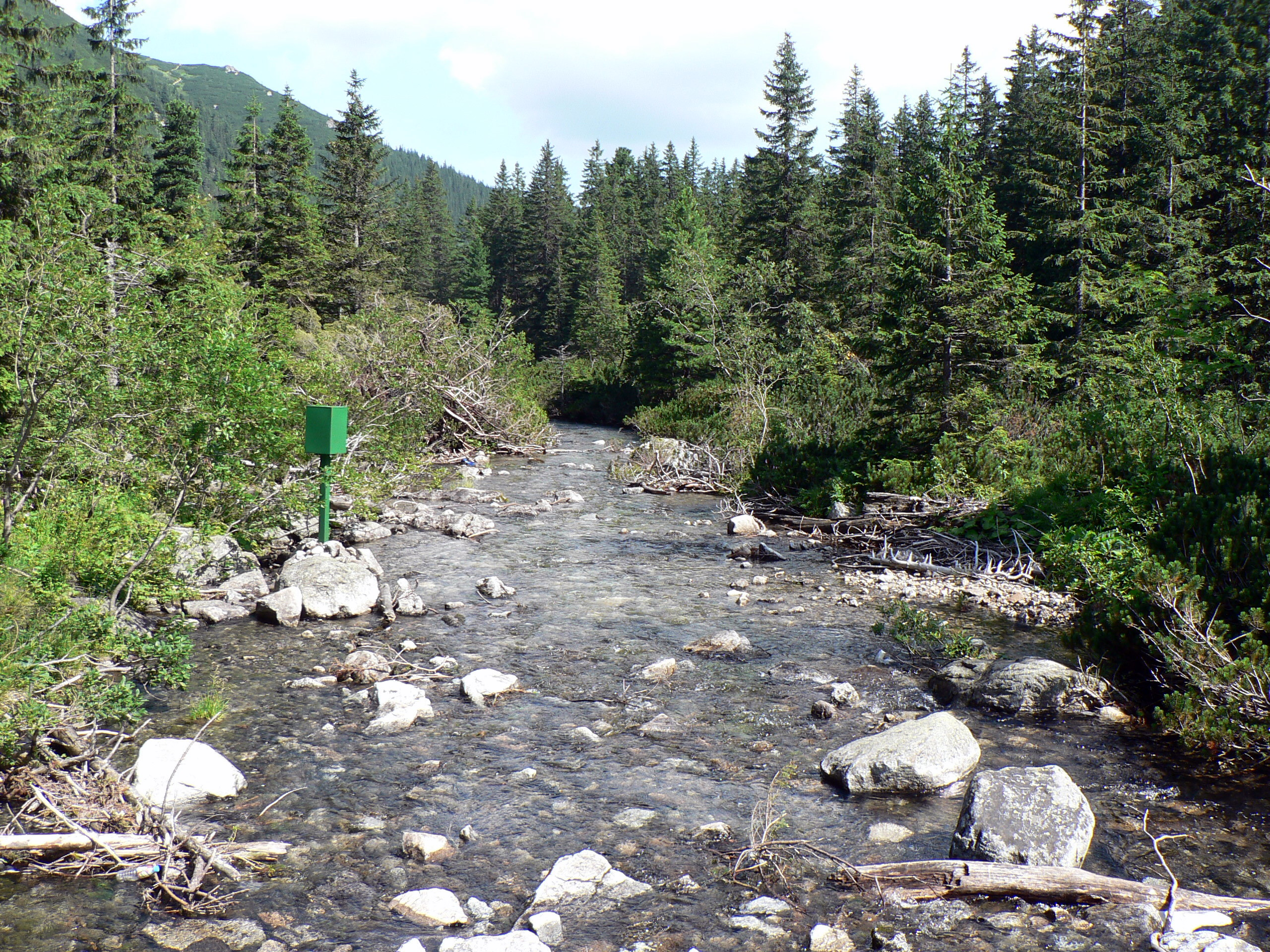 Początek Rybiego Potoku, ujście z Morskiego Oka